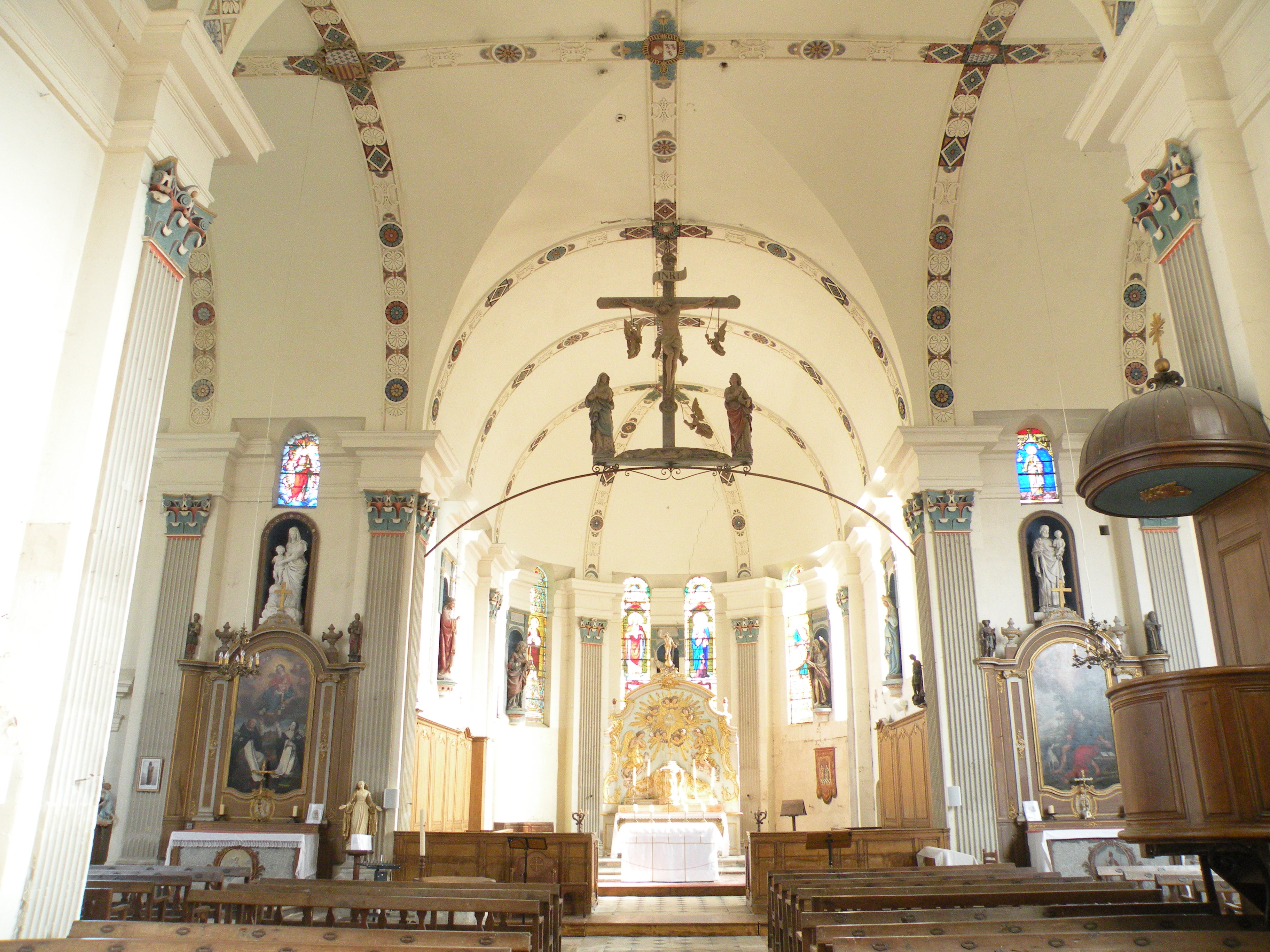 Intérieur de l'église Saint-Pierre et Saint-Paul de Jouy-sous-Thelle